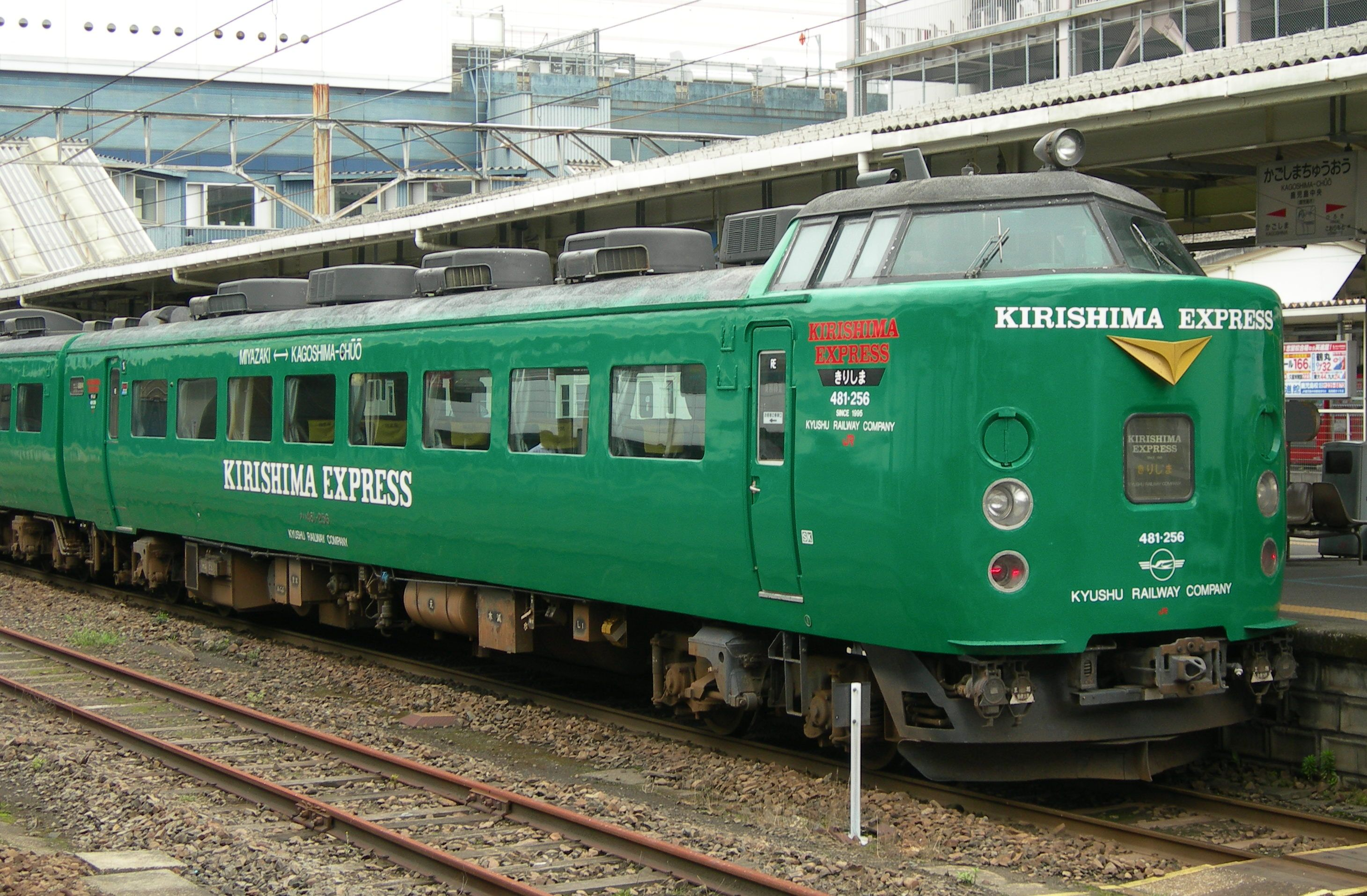 485系クハ481-256